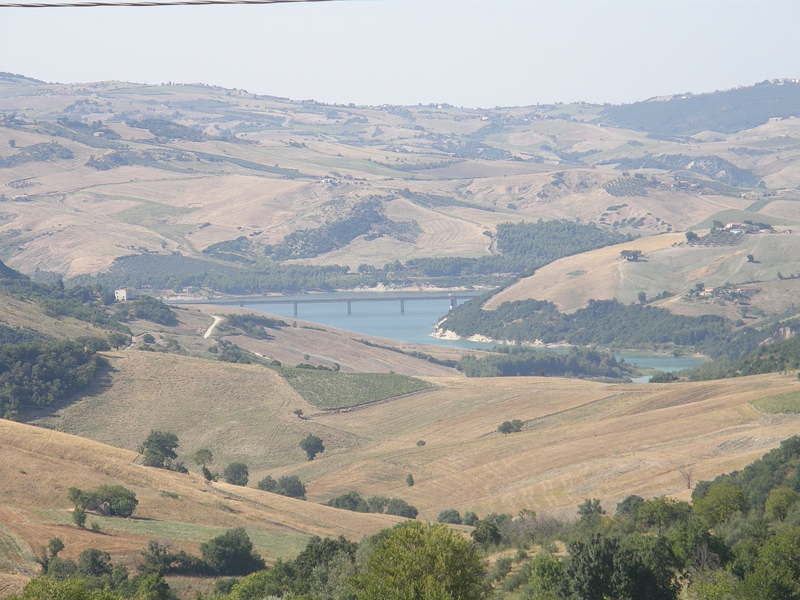 Largo di Occhito 2009